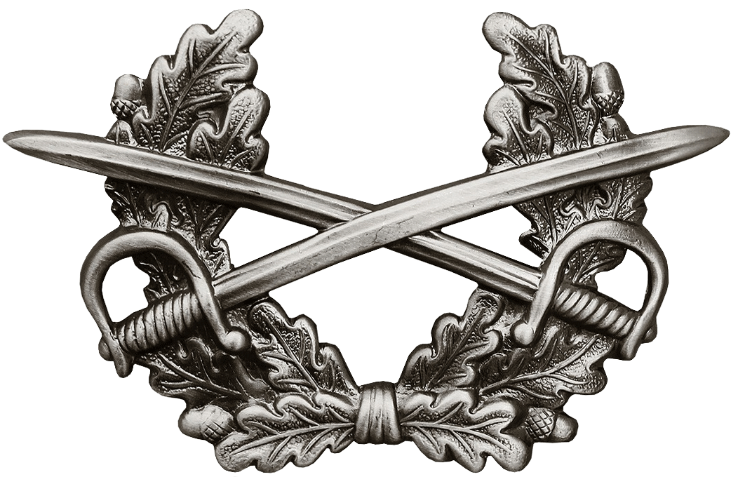 Abzeichen für die Dienstmütze der Bundeswehr für Offiziere und Oberfähnriche des Heeres Beschreibung: 2 gekreuzte Säbel mit Eichenlaubumrandung Mützenfarbe: grau Trageweise: Über der Mitte des Mützenschirms, Unterkante des Abzeichens über dem Kinnband. Maße: Breit: 75 mm Hoch: 45mm Ausführung: silberfarben, Metall